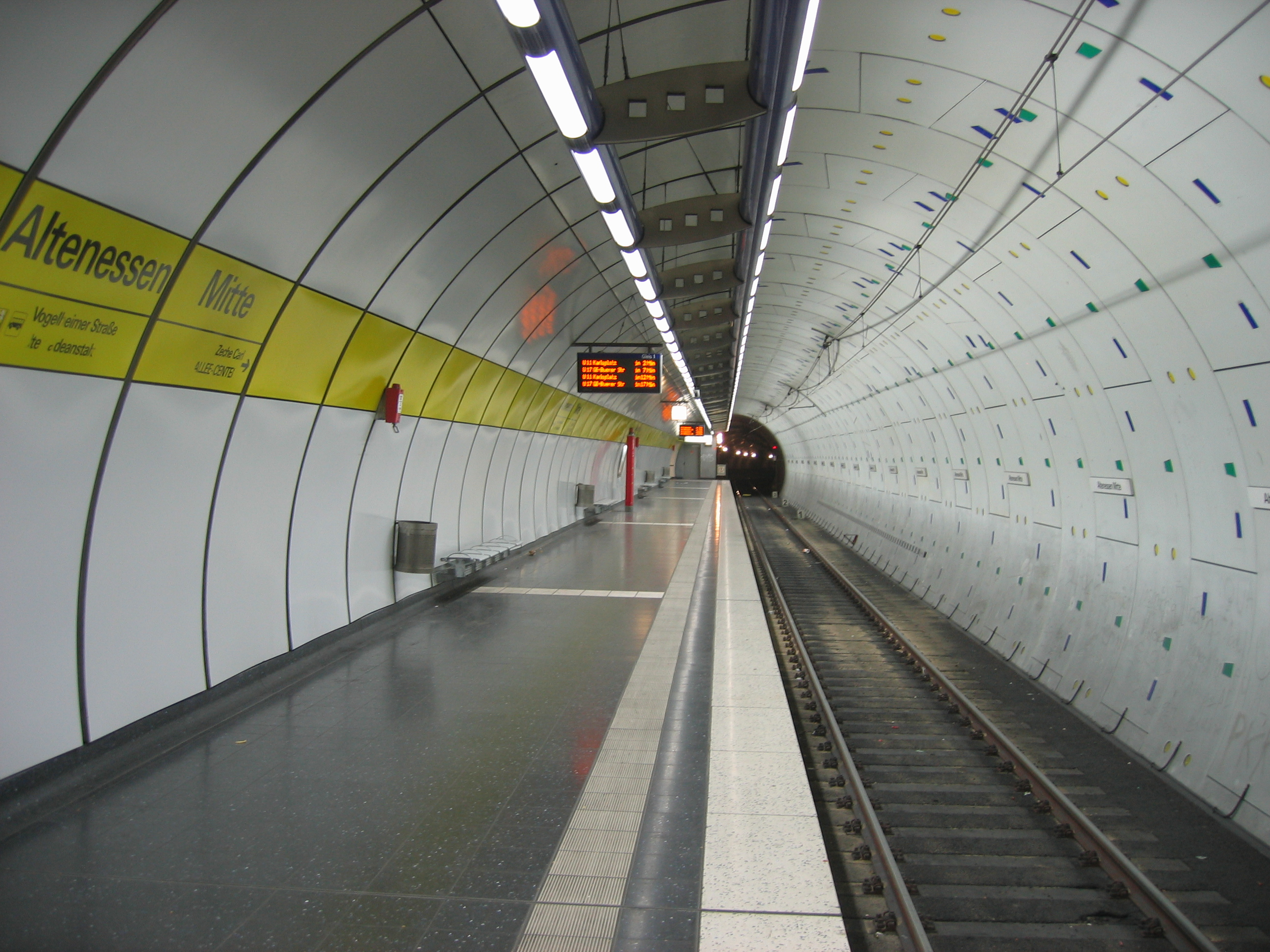 U-Bahnhof Altenessen Mitte der Stadtbahn Essen